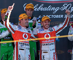 Jamie Whincup och Paul Dumbrell firar segern i Bathurst 1000 km 2012.